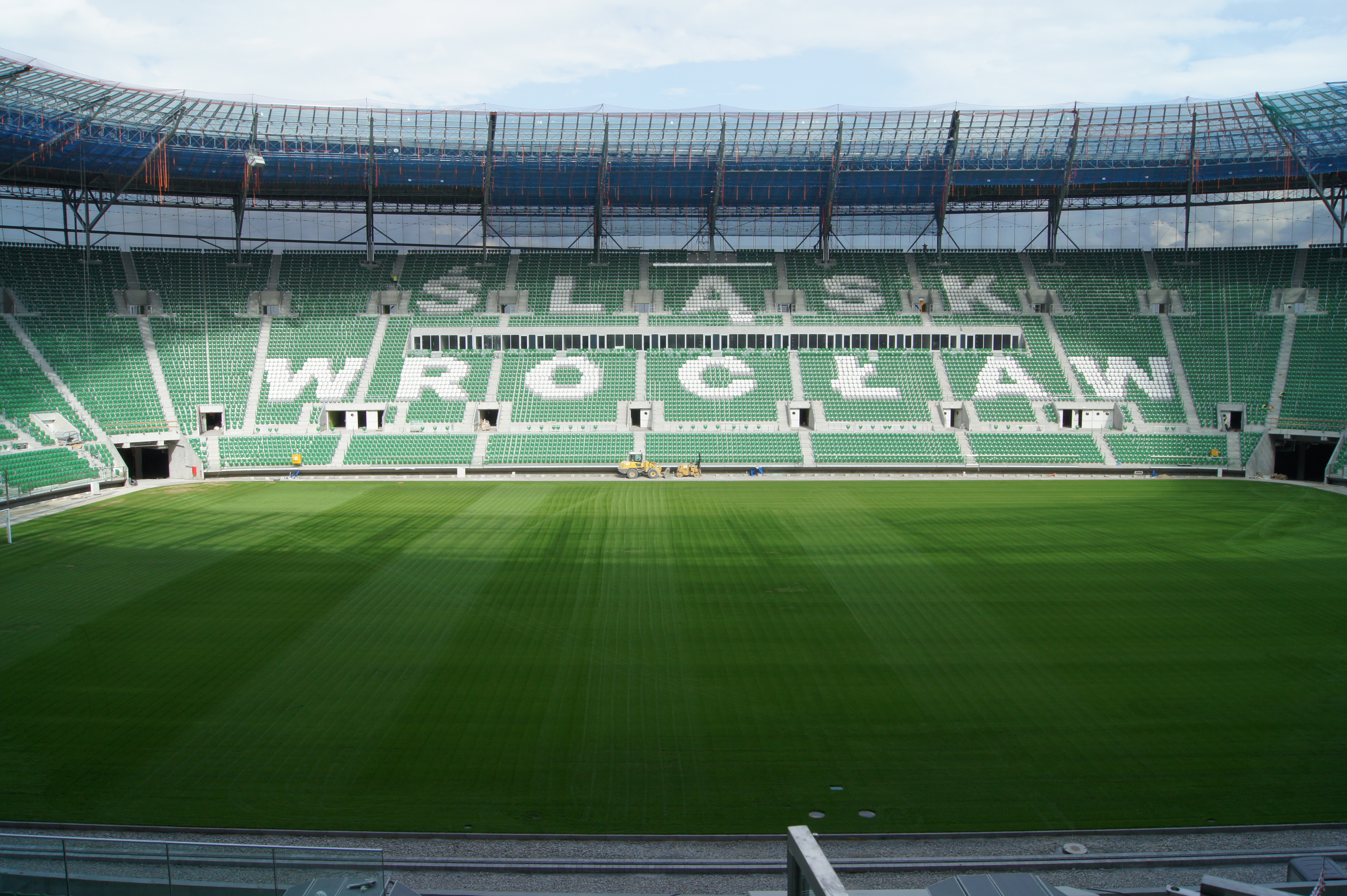 trybuna wschodnia wrocławskiego stadionu (widok z trybuny zachodniej - głównej)